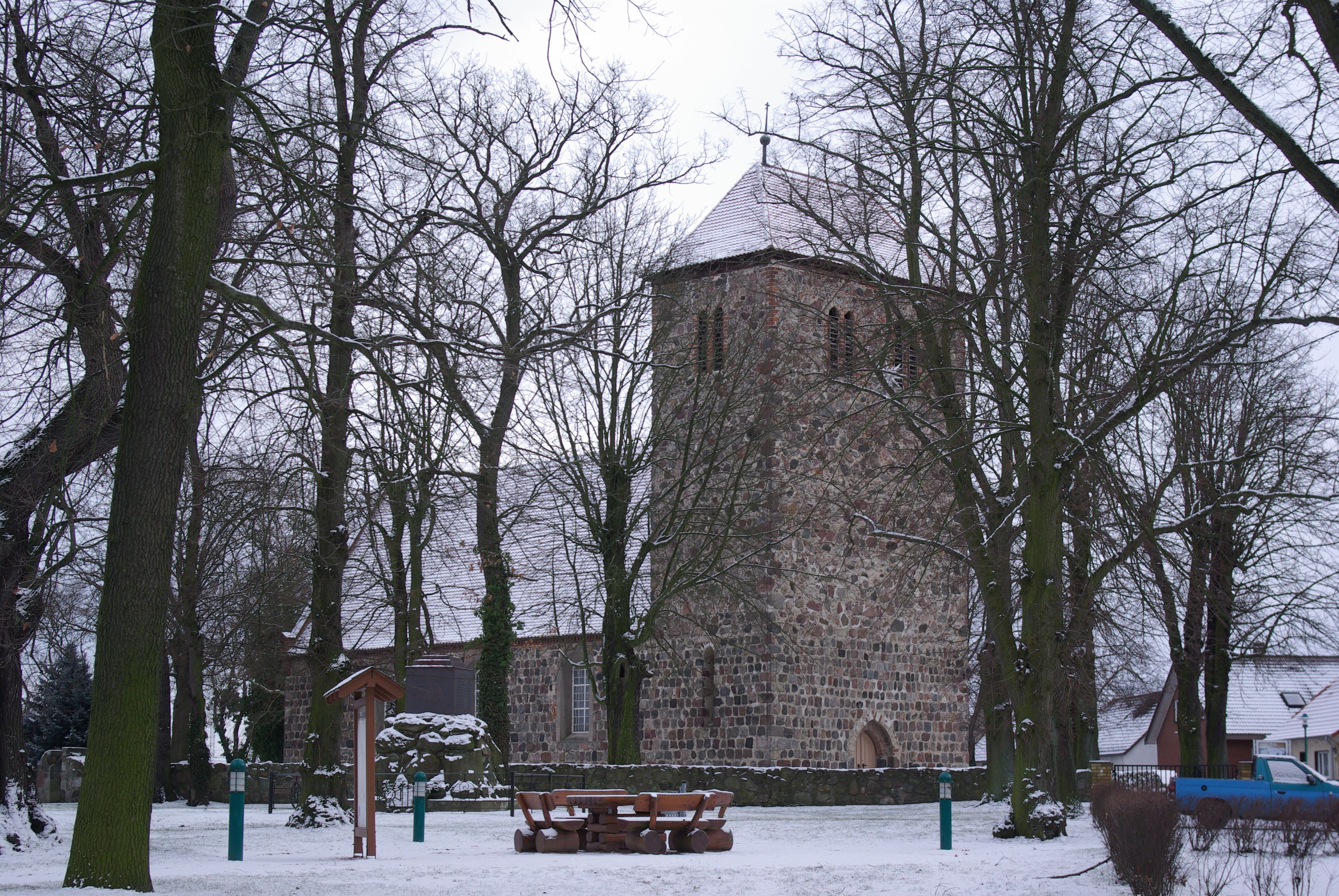 Blankenfelde-Mahlow, Brandenburg, im Ortsteil Dahlewitz die Kirche, der Blick geht von der Dorfstraße Ecke Rangsdorfer Weg (geotag in den exif-Daten).